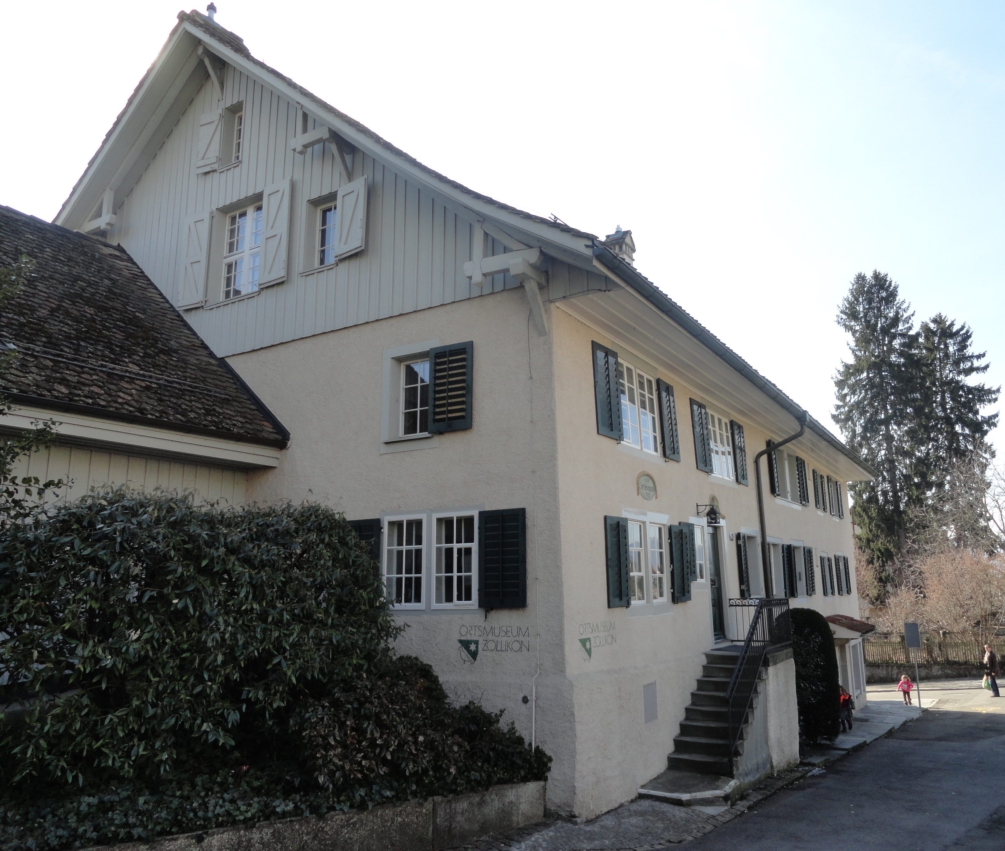 Haus Im Felsengrund Nordseite mit Eingang